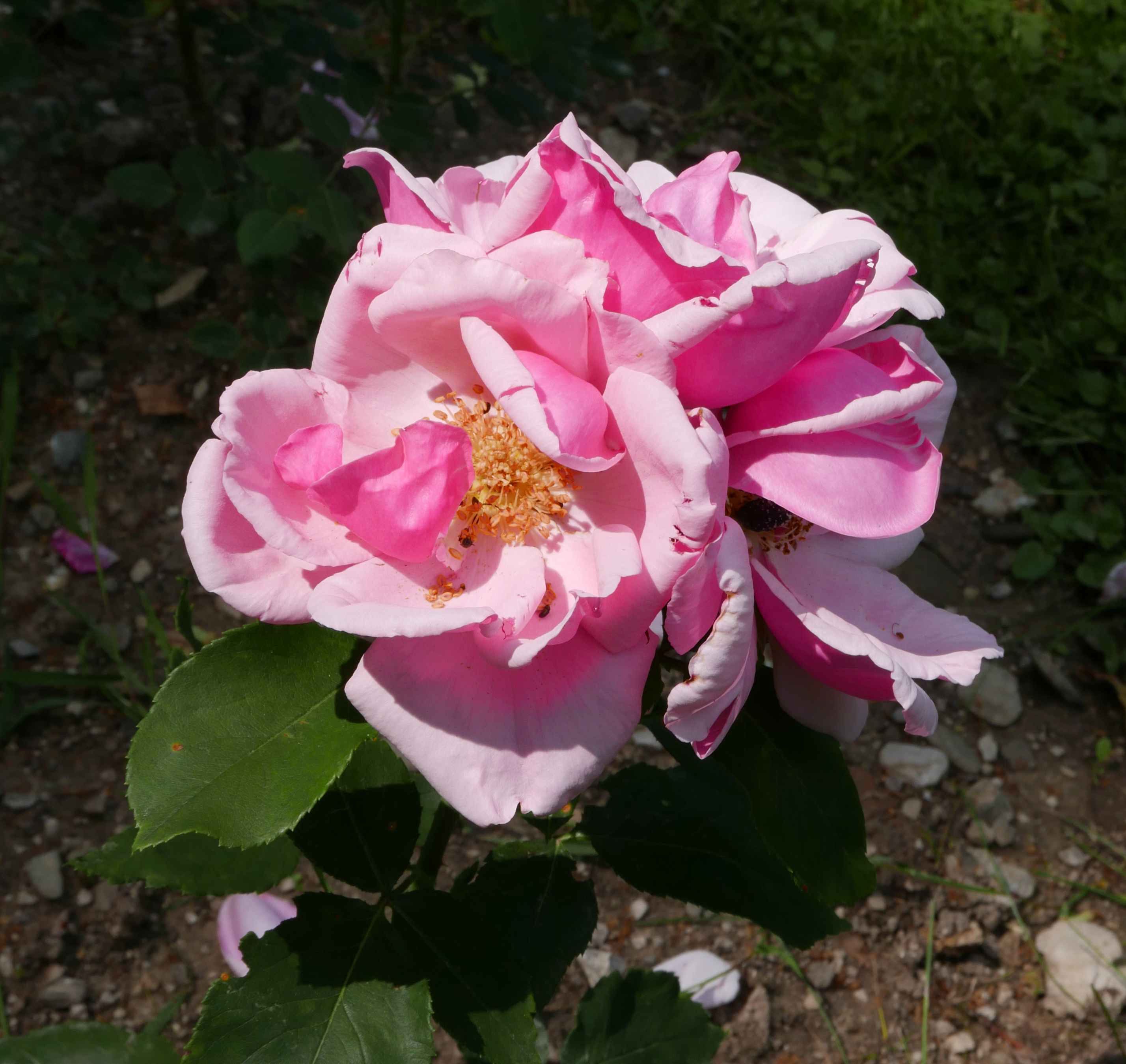 Rosarium Baden im Doblhoffpark (BD-122) : Rosa 'Lady Mary Witzwilliam' Henry Bennett, vor 1880